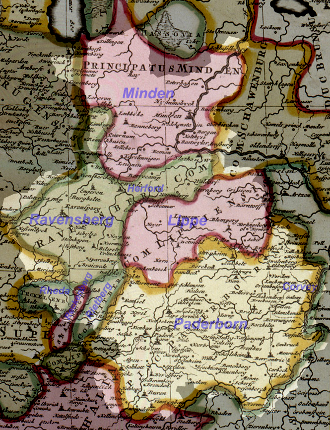 Today's area of Ostwestfalen-Lippe as of 1710